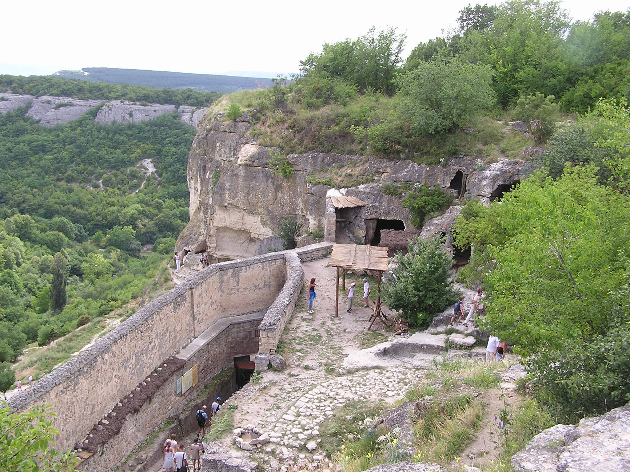 Чуфут-кале.